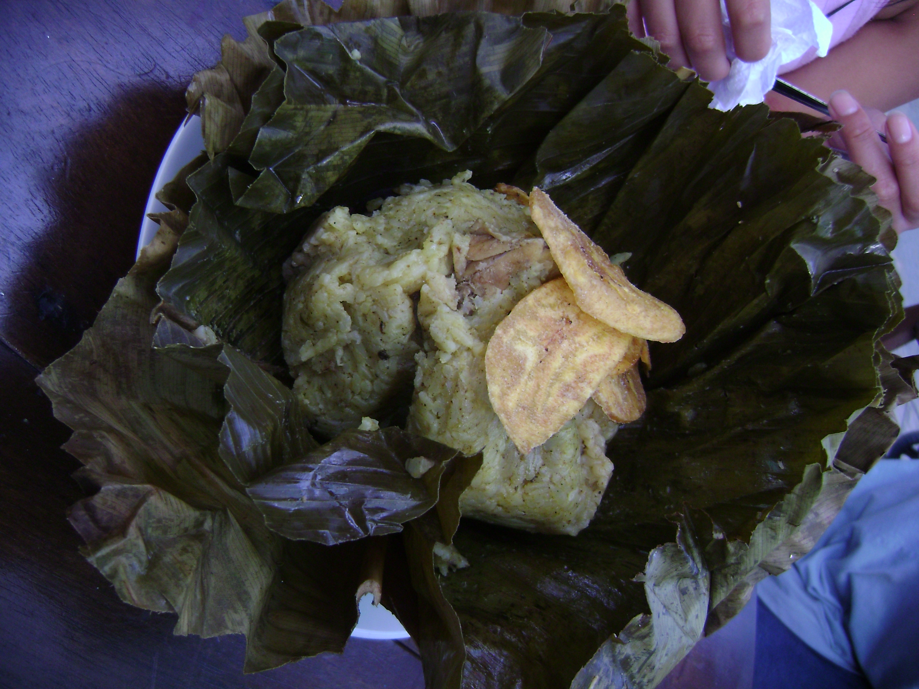 Juane